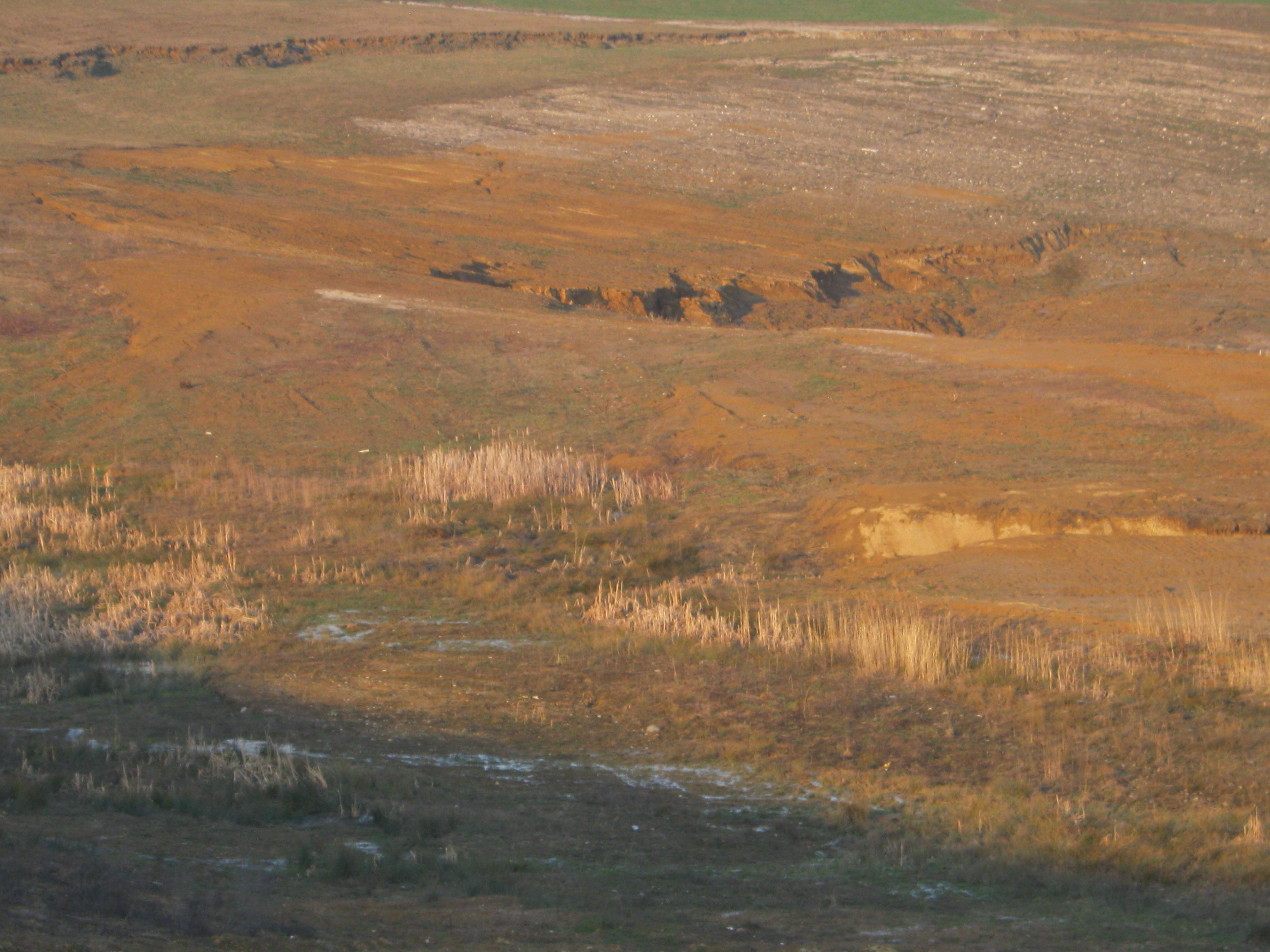 Ugrezanje zemlje. Površina pod katero se izkopava lignit, se spreminja (ugreza).